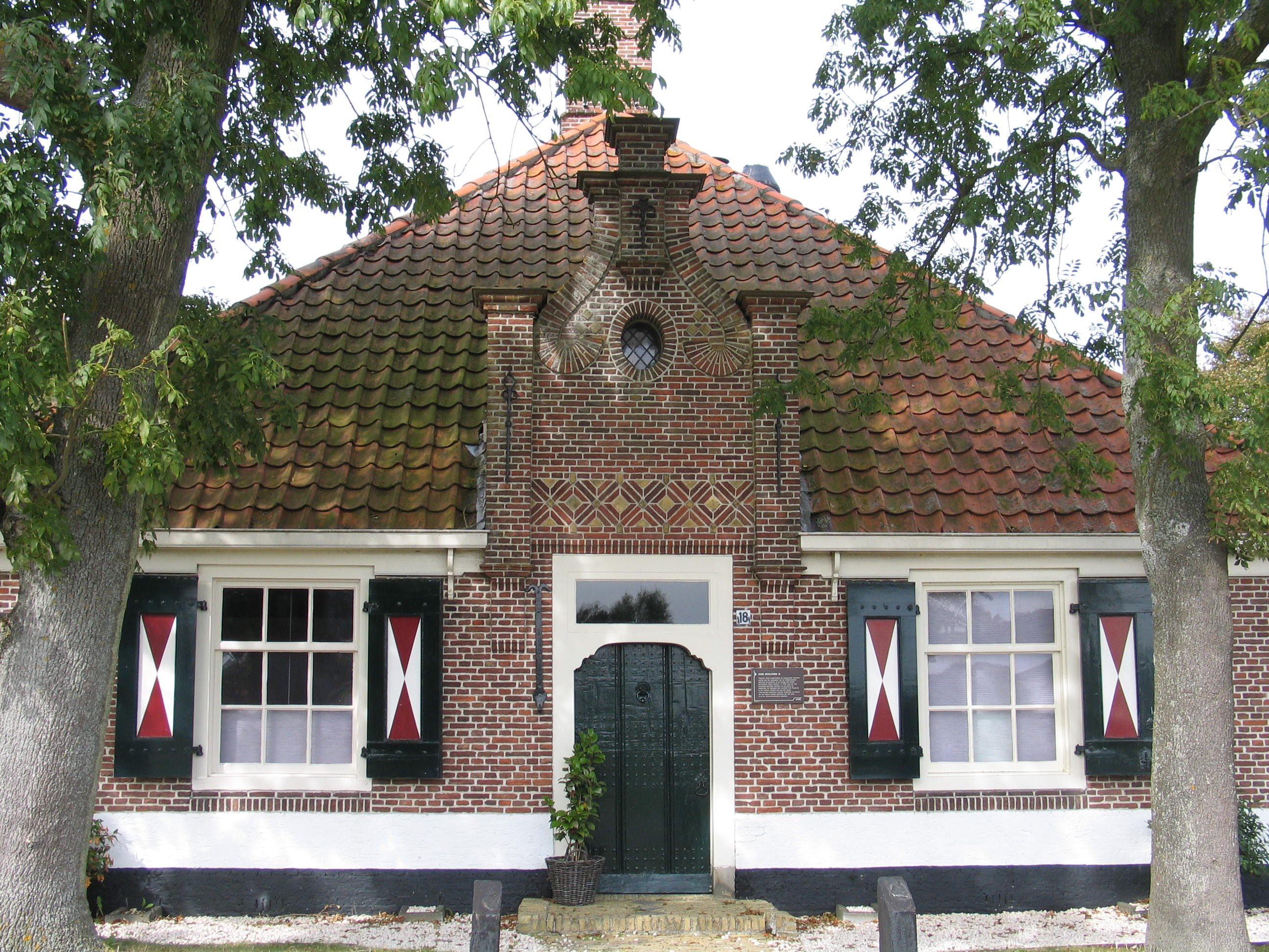 Een op de Monumentenlijst geplaatste boerderij bij Egmond aan den Hoef. Deze boerderij is geïnspireerd op de stolpboerderij en ontstaan in de eerste helft van de 20e eeuw, met gebruik van oud materiaal dat van elders kwam.